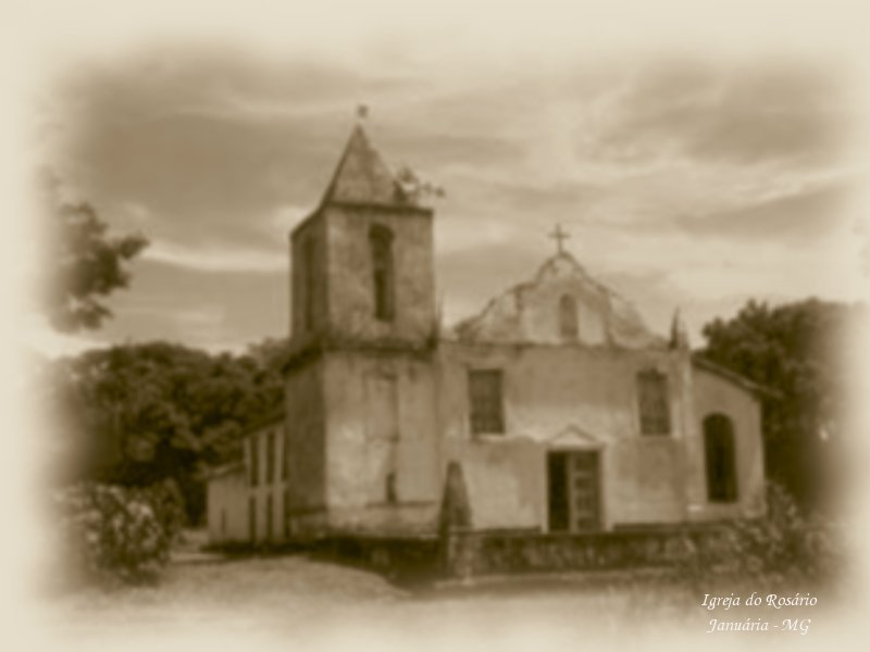 Igreja do Rosário situada no distrito do Brejo do Amaparo na cidade de Januária-MG